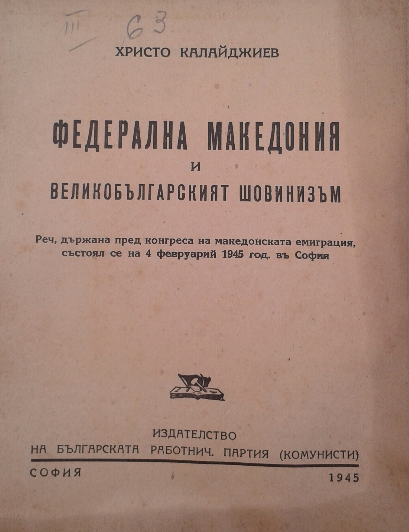 Корицата на книгата „Федерална Македония и великобългарския шовинизъм“